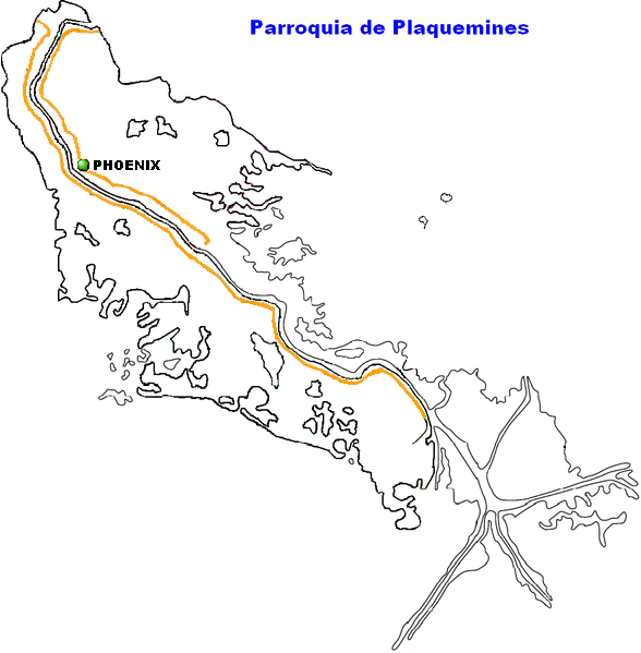 Phoenix, Louisiana.